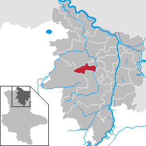 Rochau im Landkreis Stendal, Sachsen-Anhalt